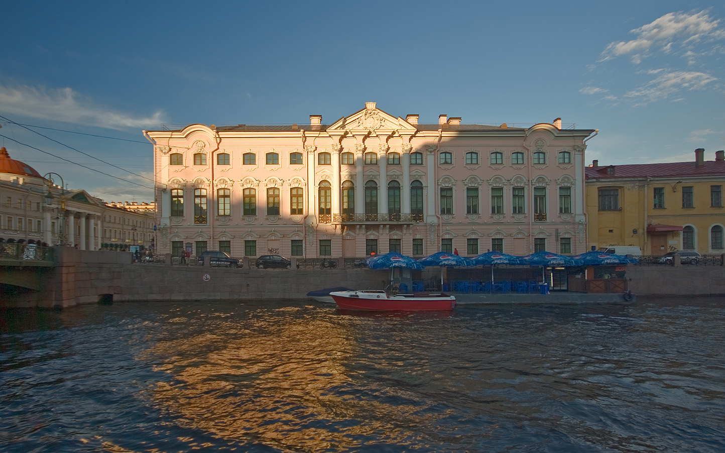 Строгановский дворец, Санкт-Петербург. Фасад со стороны Мойки.